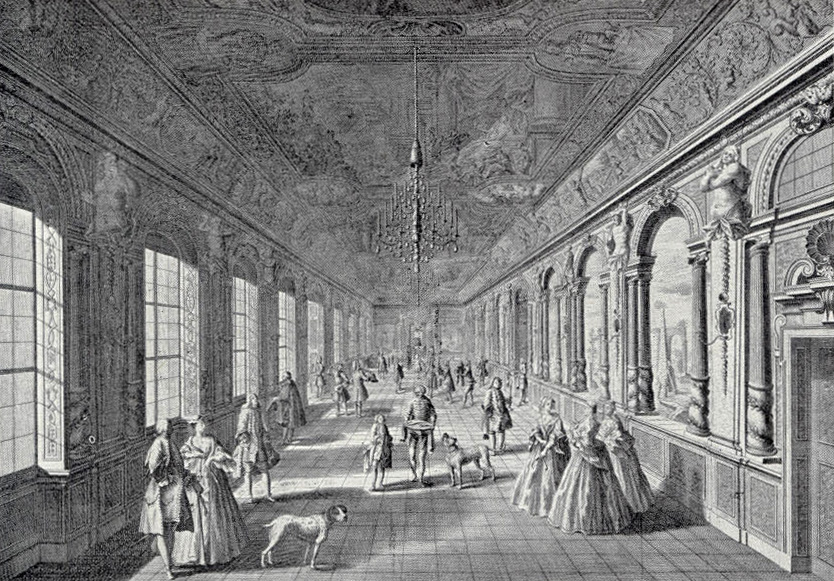 "Prospect der innwendigen Gallerie des Garten-Gebäudes" - Detailinnenansicht des Schlösschens in der Favorite nach einem Stich von Salomon Kleiner, 1726